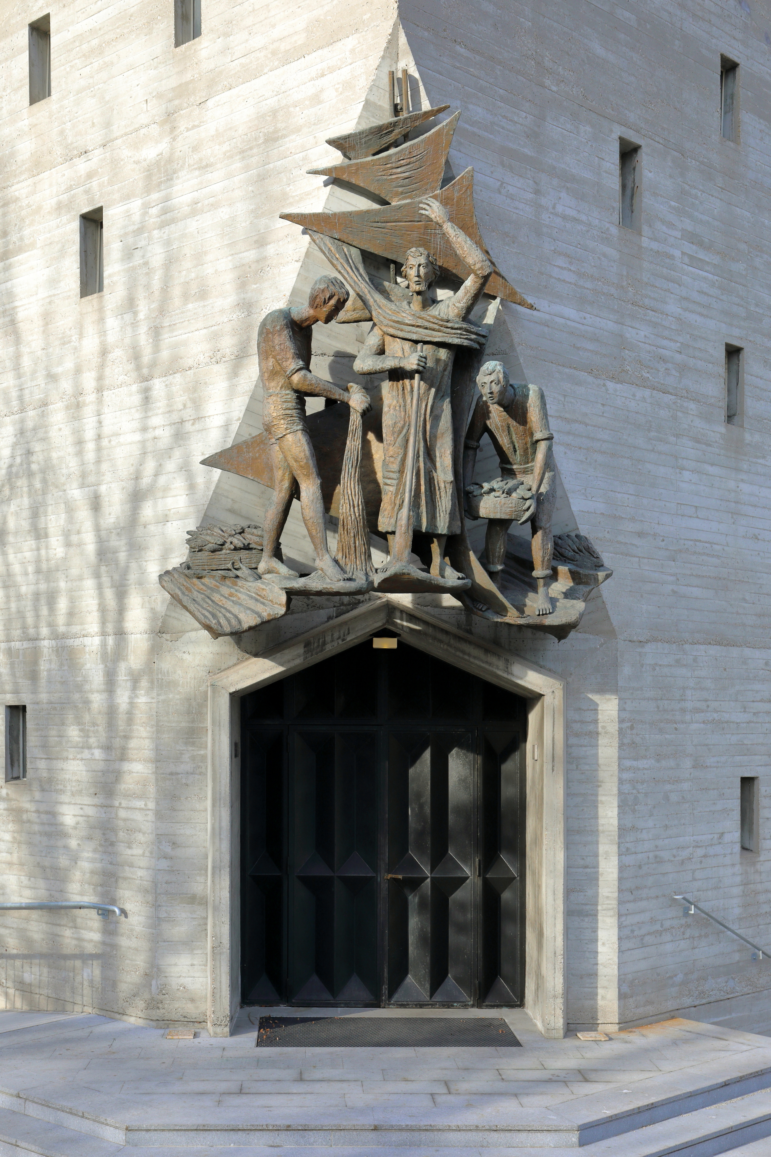 Hauptportal der Pfarrkirche Zum Guten Hirten im 13. Wiener Bezirk Hietzing.Über dem Haupteingang befindet sich die Bronzeplastik Der Fischfang, ein Werk vom italienischen Bildhauer Gianluigi Giudici aus dem Jahr 1992.